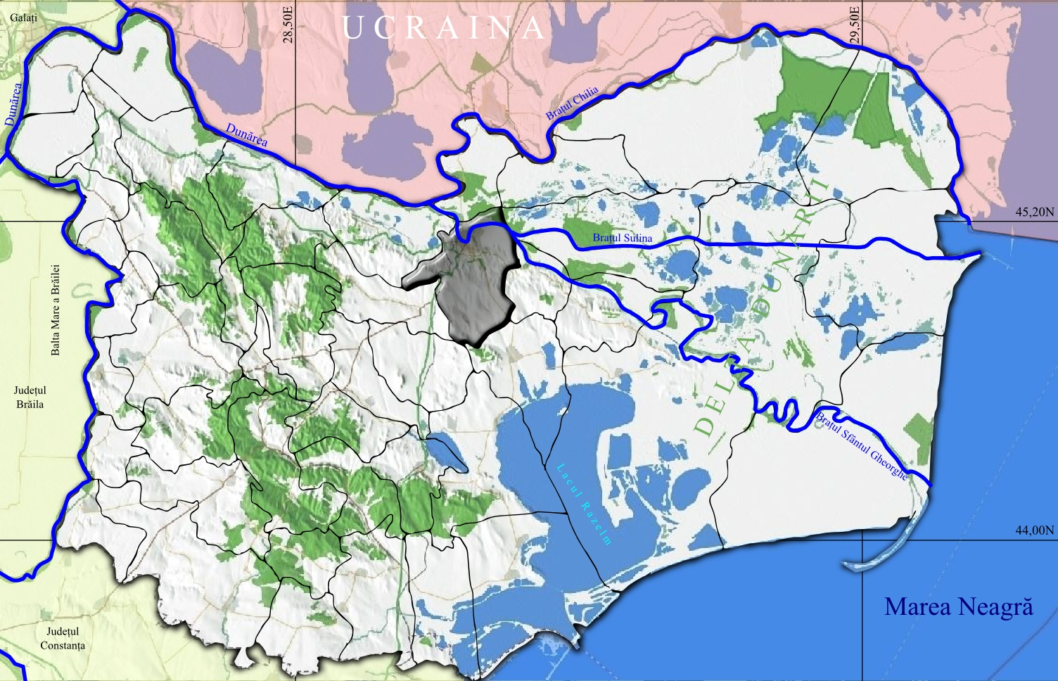 Tulcea judetul Tulcea.